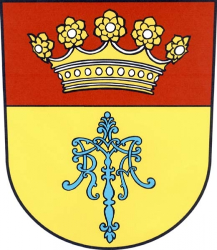 Znak obce Vranov u Brna